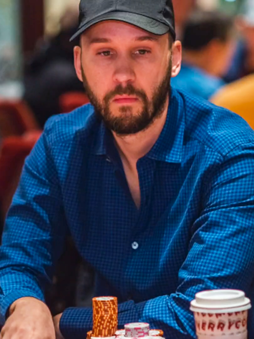 Jonathan Depa beim WPT Five Diamond World Poker Classic